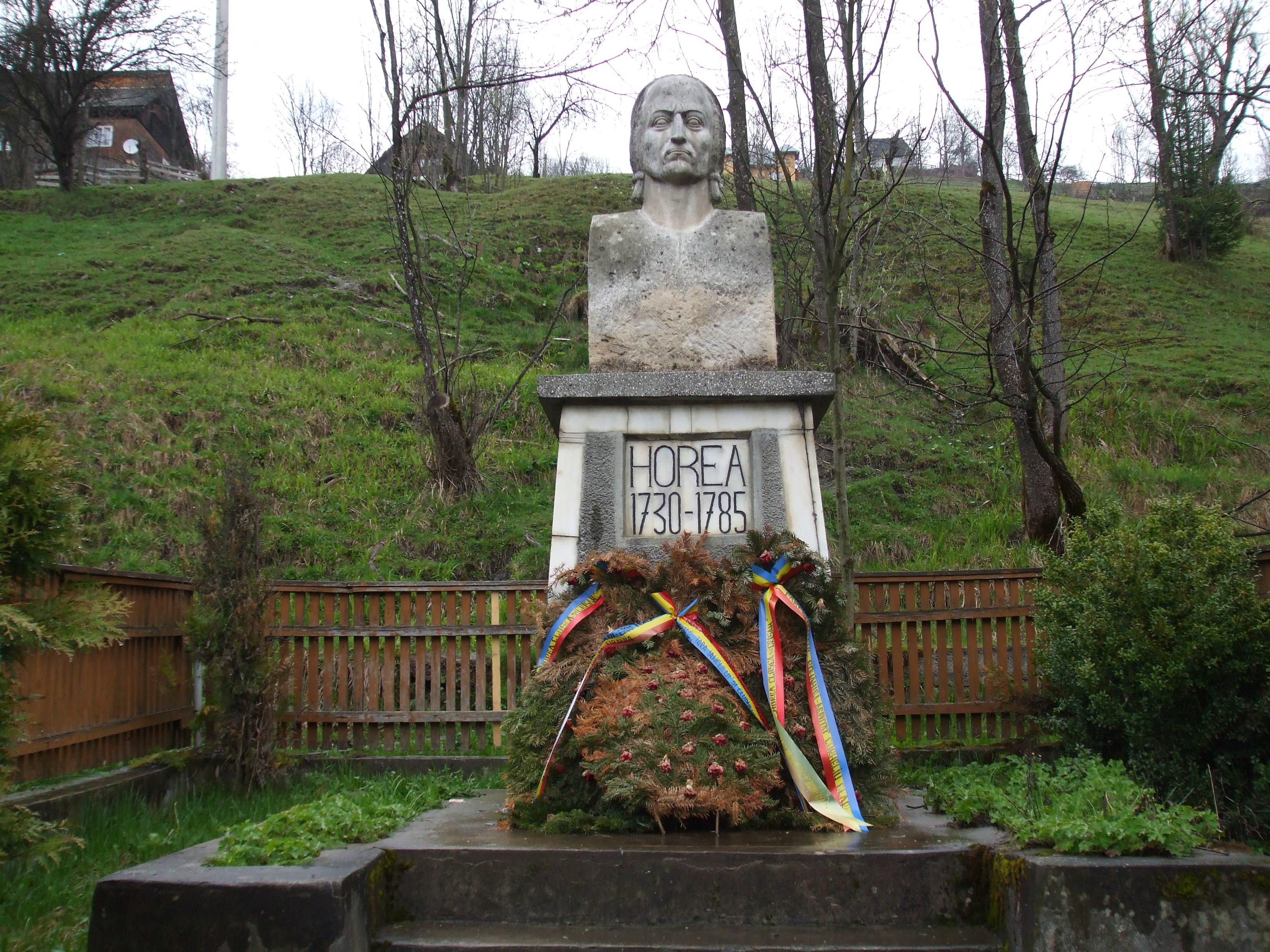 Bustul lui Horea din comuna Horea, judeţul Alba - lucrare realizată de sculptorul Ion Vasiu , in anul 1982.